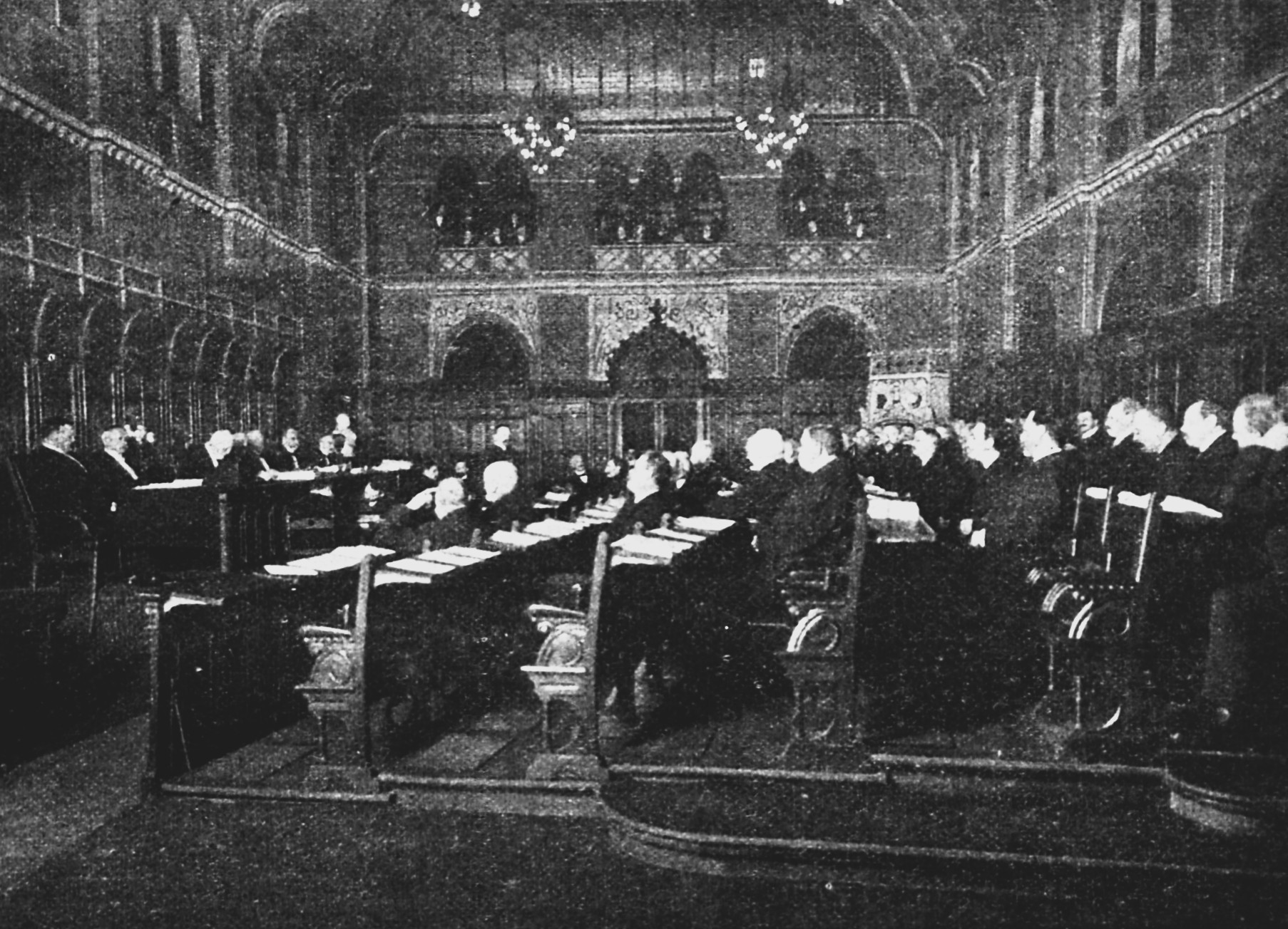 Aus einer Sitzung der Lübecker Bürgerschaft. Links, auf erhöhtem Sitz, Senatskommissare und Wortführer.